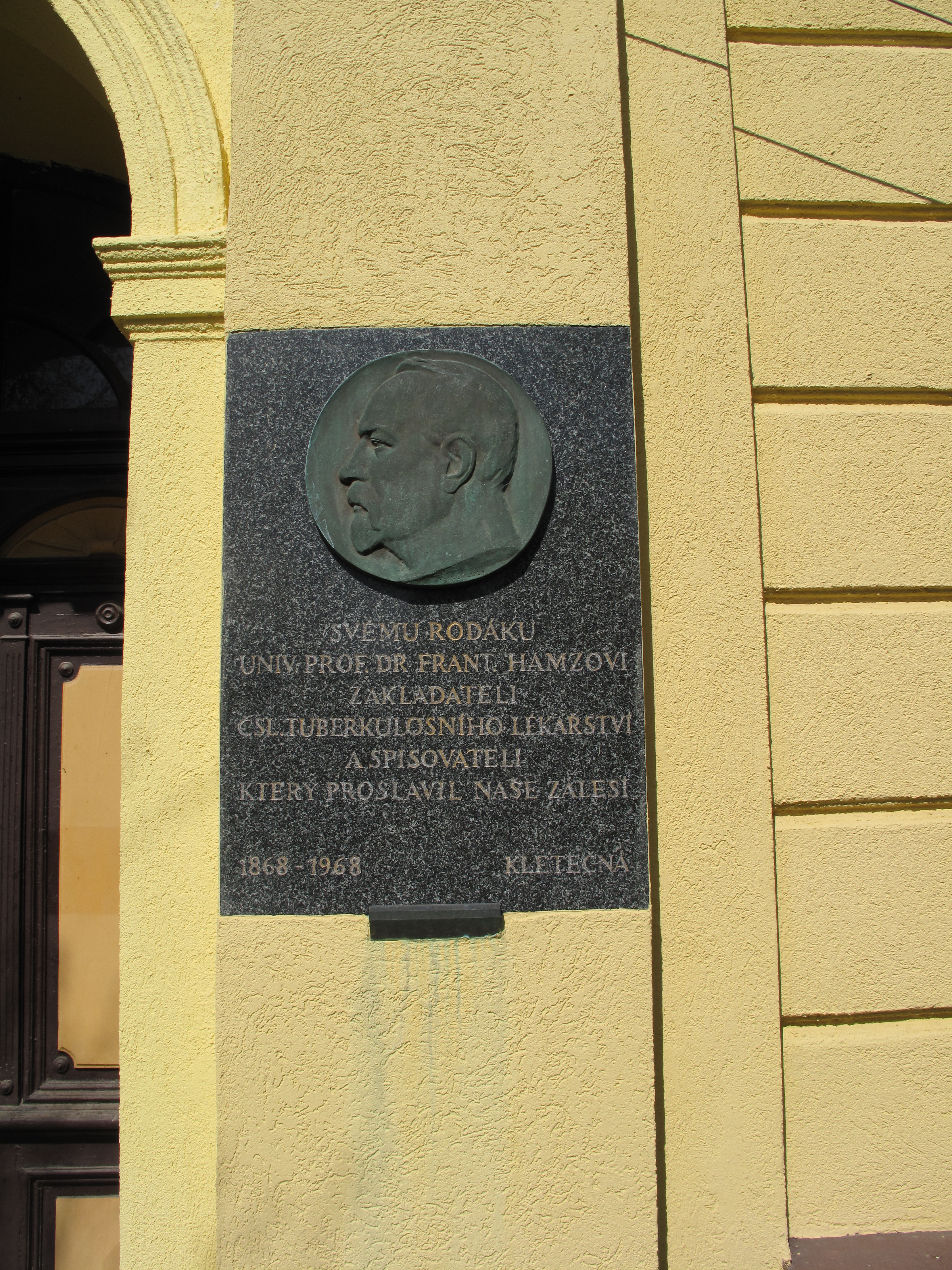 Pamětní deska v Kletečné. Okres Pelhřimov, Česká republika.